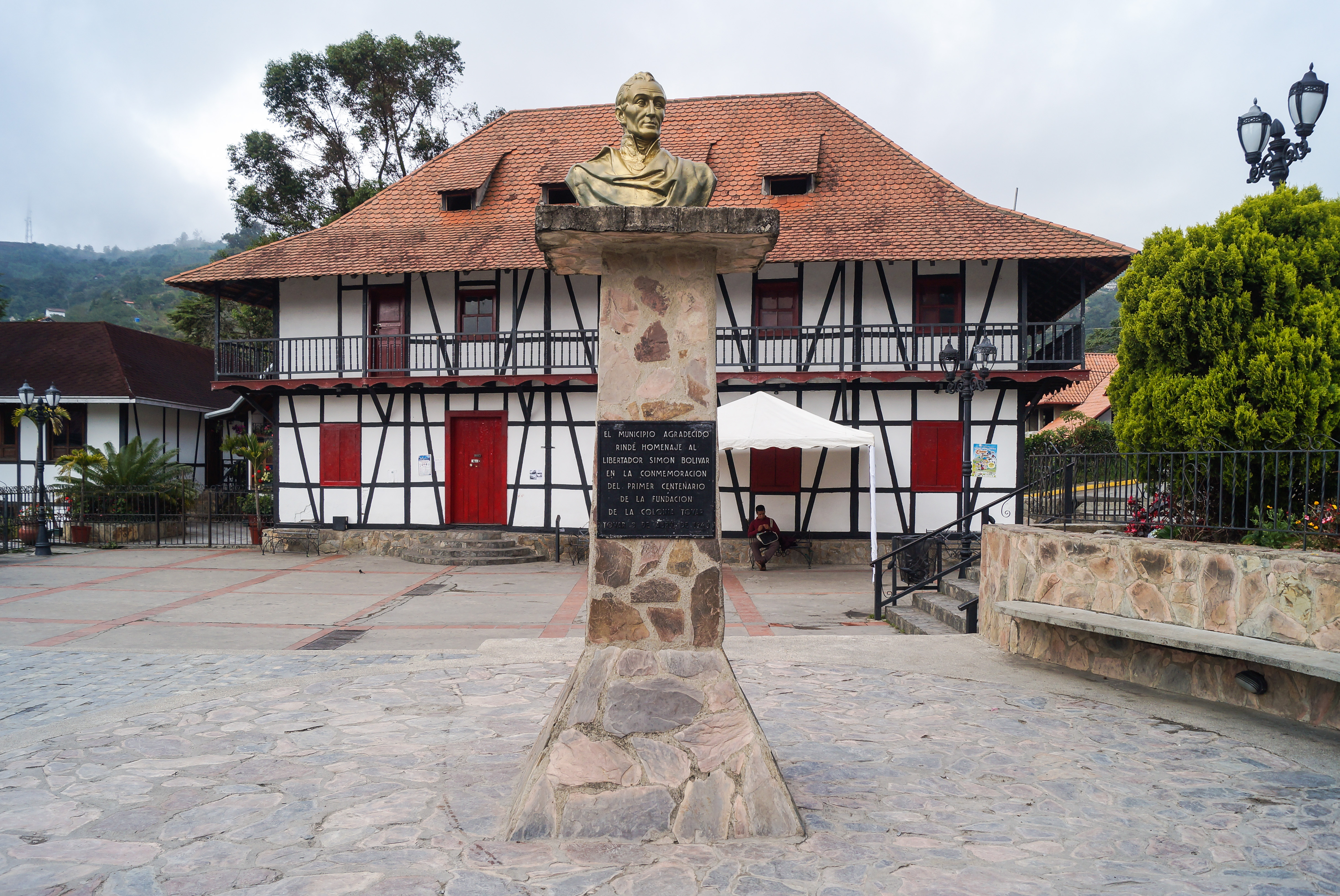 Construcción civil que data del año 1916. En ella funcionó la primera escuela de la Colonia. Fue la primera edificación de arquitectura coloniera en la que intervino un arquitecto residenciado en Caracas, Eduardo Röhl. La construcción se llevó a cabo como parte de la iniciativa de Eduardo Röhl, Alfredo Jahn y del cónsul alemán de entonces, Von Prollius. Los colonos contribuyeron en gran parte a su levantamiento mediante el aporte de la mano de obra gratuita. El edificio se organiza en una planta rectangular desarrollada en dos pisos y un desván. En la planta baja se encuentra un amplio salón con acceso directo desde la plaza Bolívar, mientras que a la planta alta se le accede por una escalera externa, ubicada en la parte posterior al inmueble. El volumen presenta un balcón a lo largo de todo su perímetro y un techo a cuatro aguas con faldones de menor pendiente que sirven de cubierta al balcón perimetral, además de exhibir cuatro buhardillas en el lado más largo y una, en los cortos. Fue edificada con la técnica constructiva alemana Fachwerk, entramado de madera relleno con tierra y techo de estructura de madera que, en el caso de este inmueble, fue cubierto originalmente con tablitas que luego fueron sustituidas por láminas de zinc y, finalmente, por tejas planas tipo marselleisas. En la fachada destaca el entramado de madera, en un esquema de tres secciones en la parte planta baja y dos en la parte alta, en cuyos espacios se ubican puertas y ventanas de madera. Actualmente funciona en esta infraestructura el Centro Bolivariano de Informática y Telemática. Finalmente, en la década de 1940, con motivo del centenario de la Colonia, se erige en este espacio público un busto de Simón Bolívar y fue cuando se inauguró como plaza Bolívar. Estado Aragua. Venezuela.